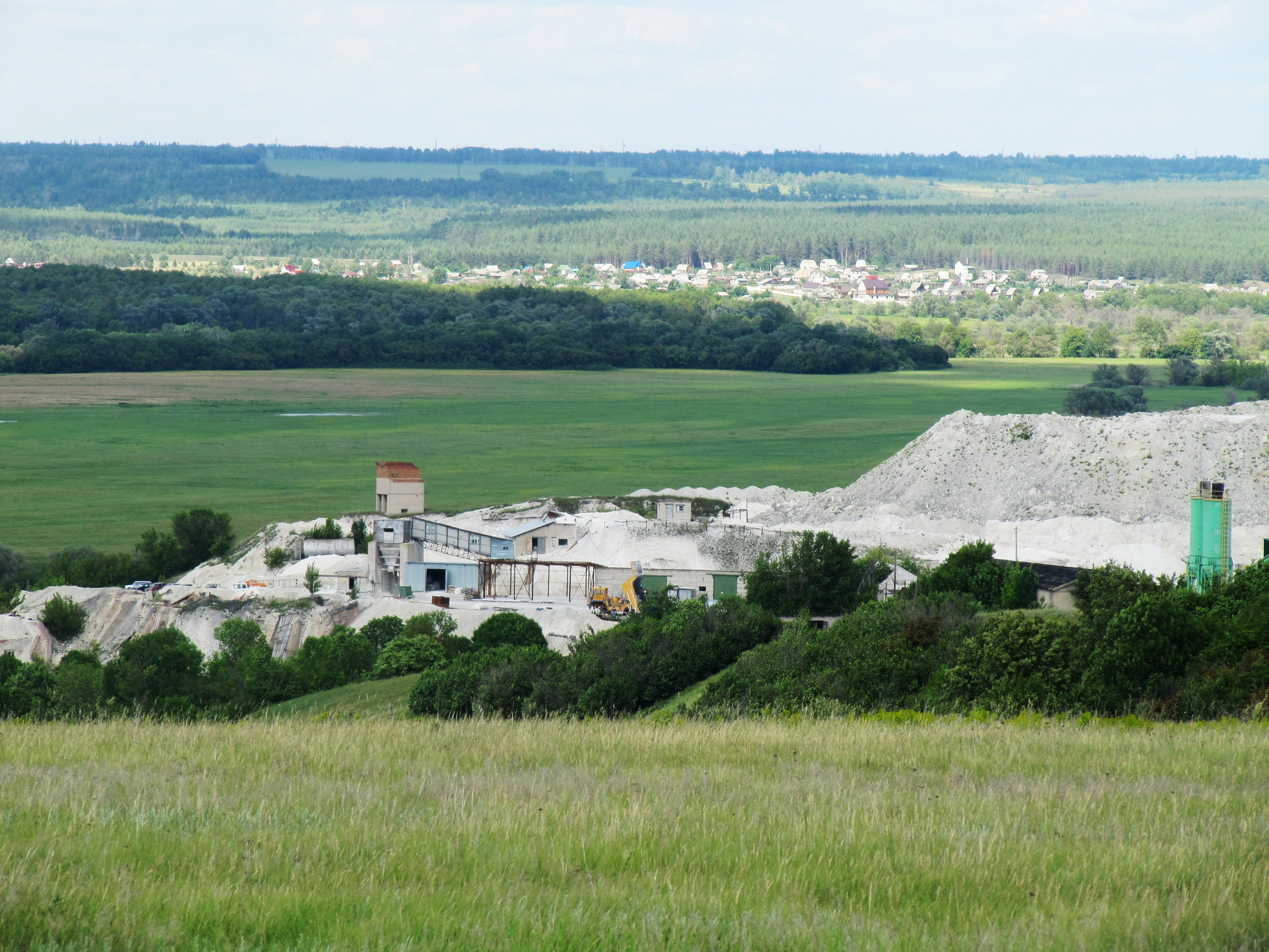 Добыча мела на Крупенниковском месторождении близ села Селявное Лискинского района.